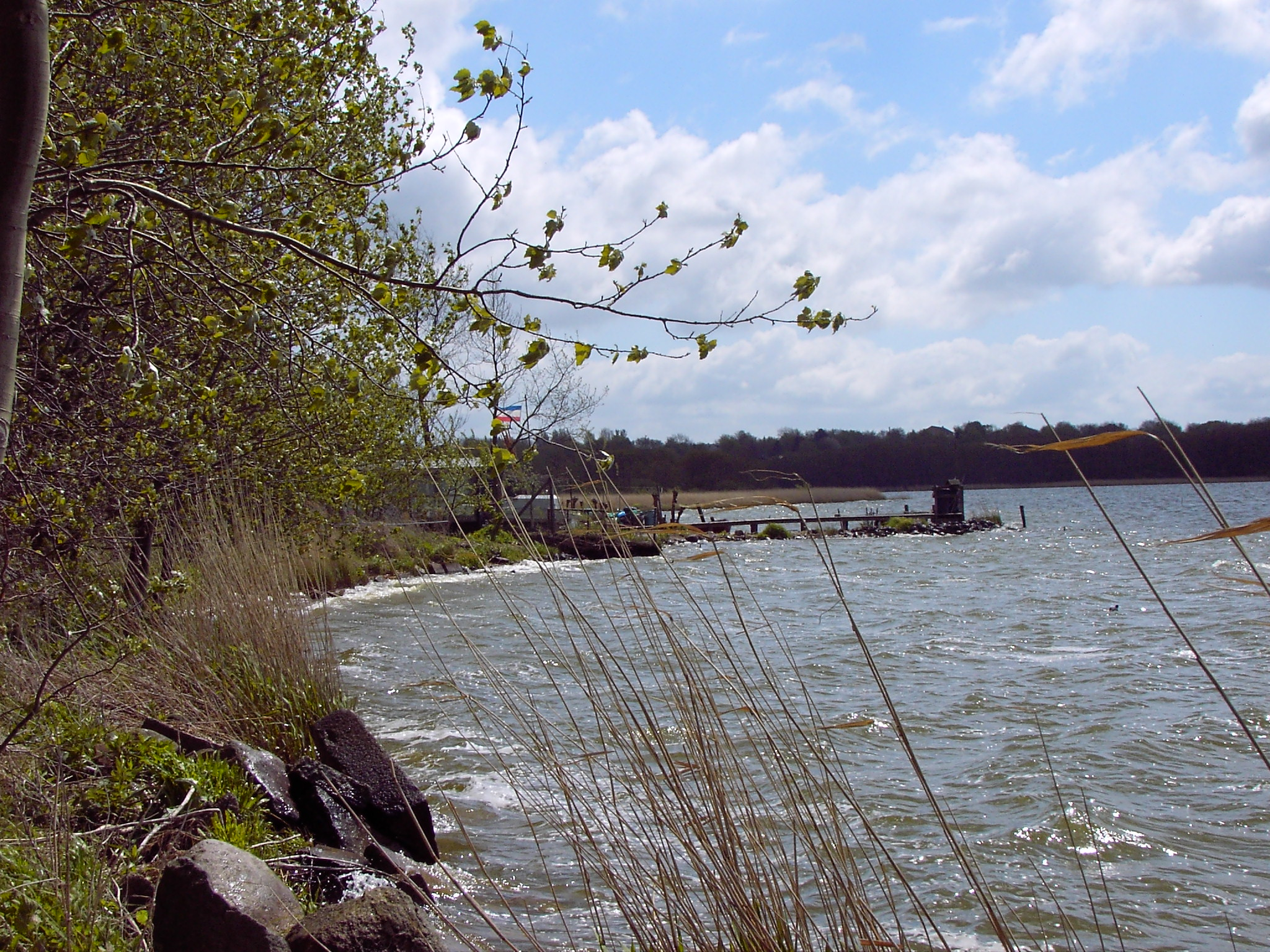 Windebyer Noor